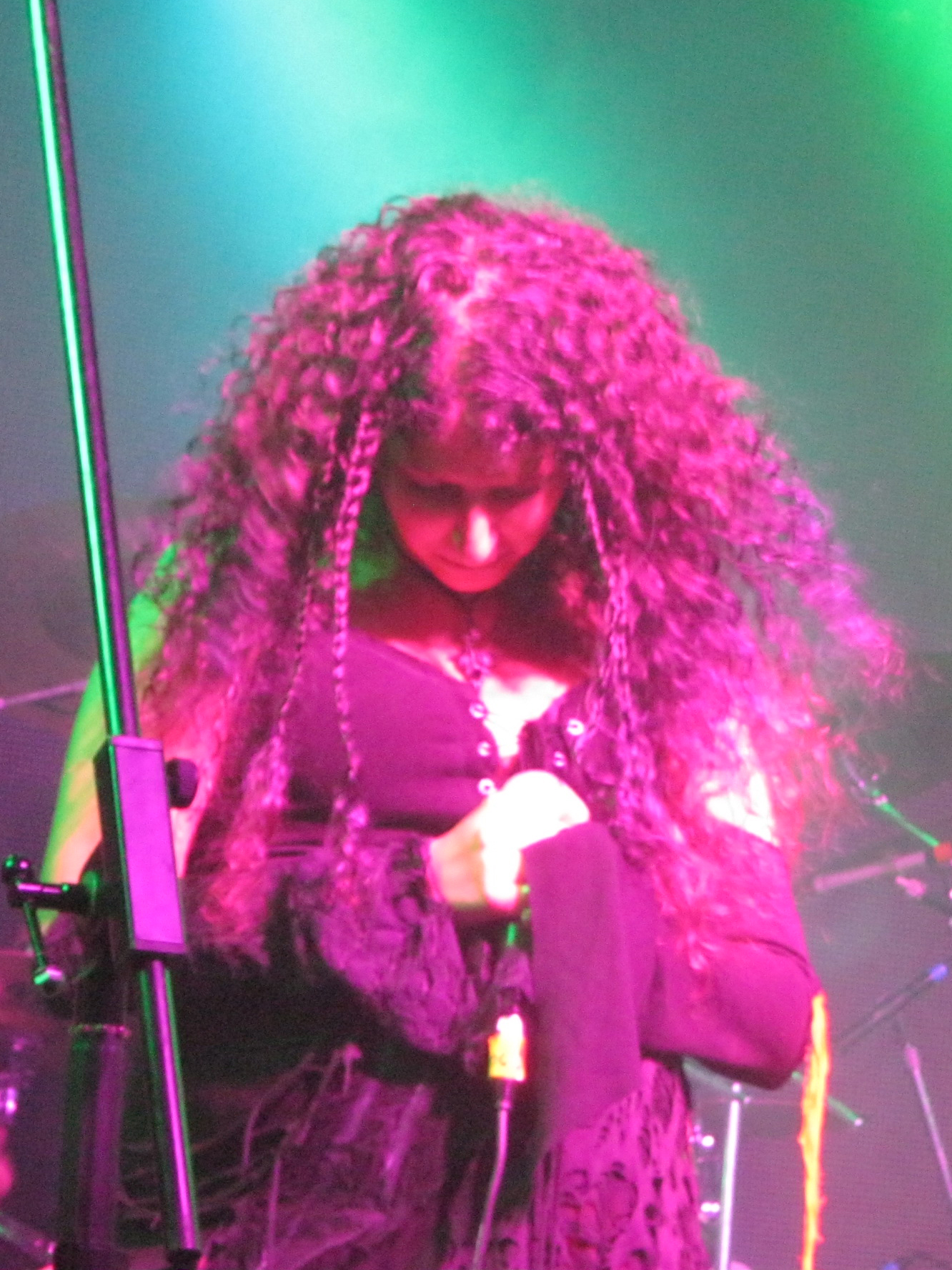 Orpheus Blade